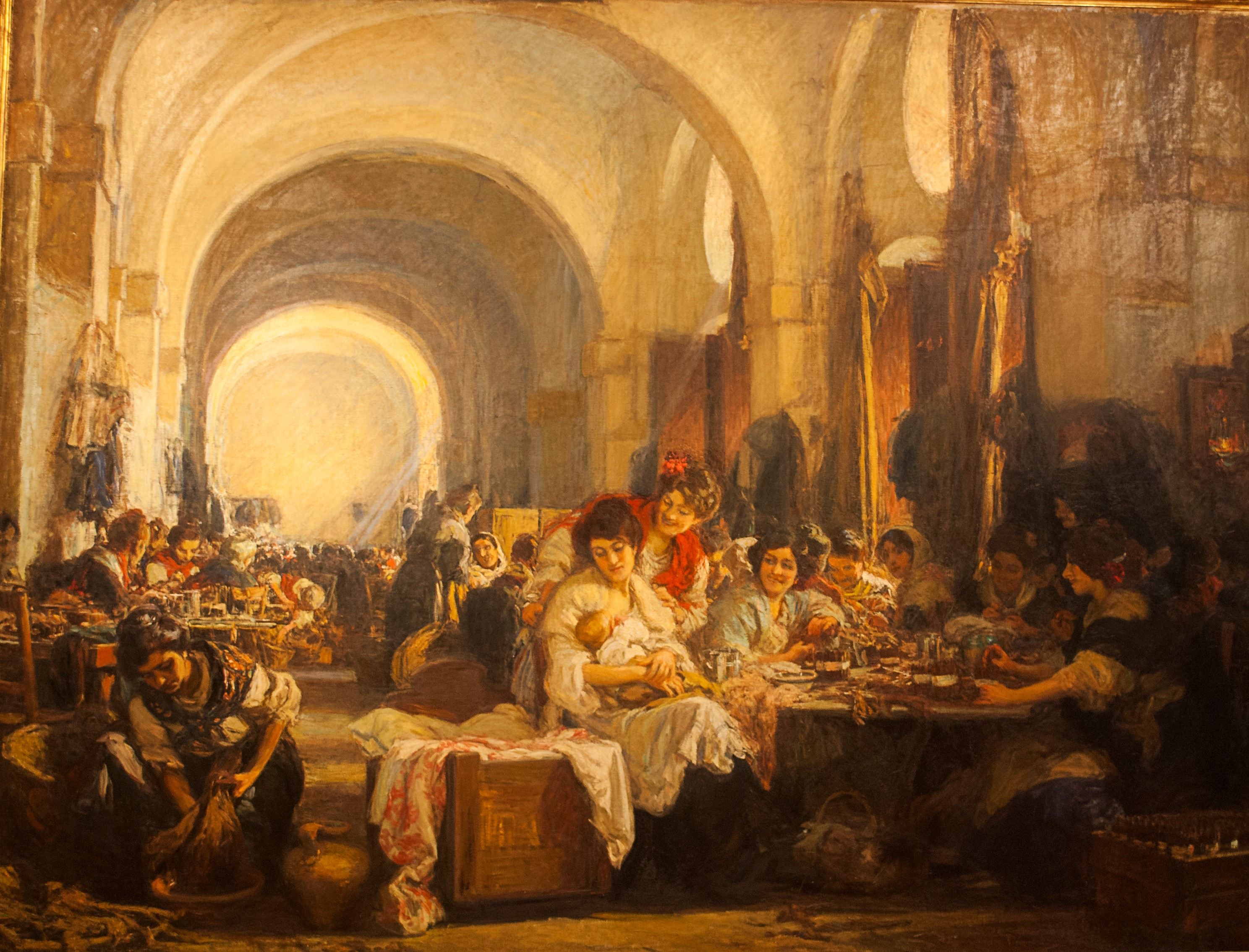 Las Cigarerras, obra de Gonzalo Bilbao (1915). Museo de Bellas Artes de Sevilla